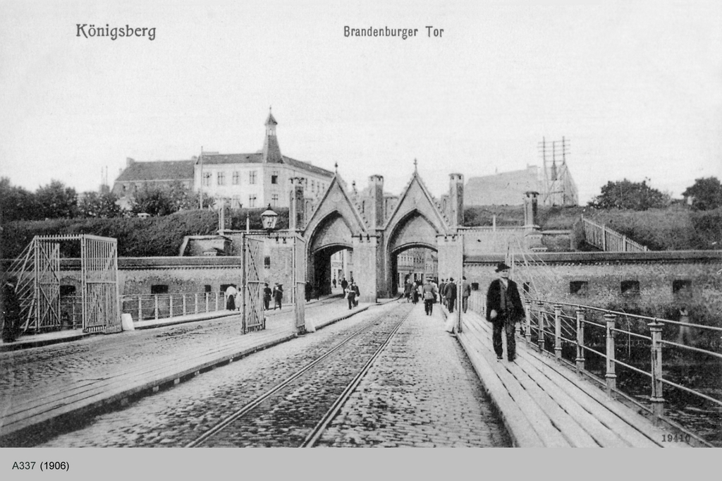 Brandenburger Tor